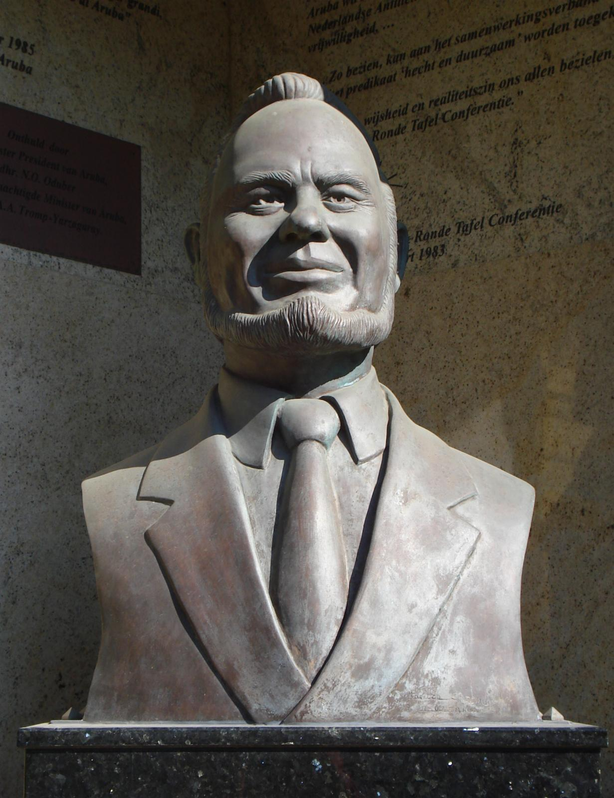 Den Haag, Schimmelpennincklaan. Borstbeeld Betico Croes (2003) van Maritza Erasmus. The Hague/The Netherlands.